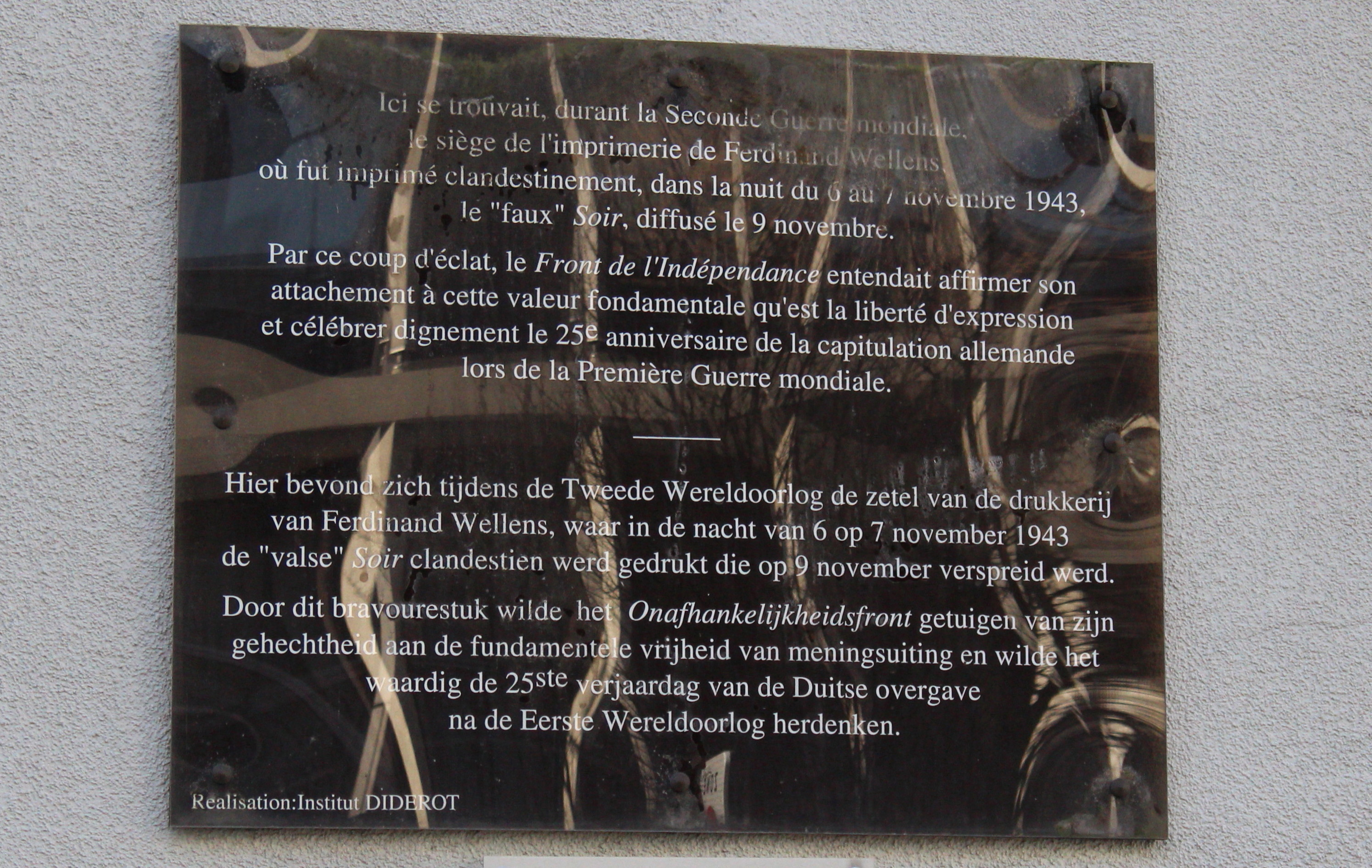 Rue de Ruysbroeck 35, Bruxelles, Belgique. Plaque commémorative apposée à l'endroit où se trouvait le siège de l'imprimerie de Ferdinand Wellens, où le Faux Soir fut imprimé clandestinement, dans la nuit du 6 au 7 novembre 1943.